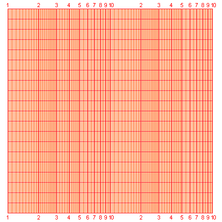 Waagerecht einfachlogarithmisches Papier GFDL